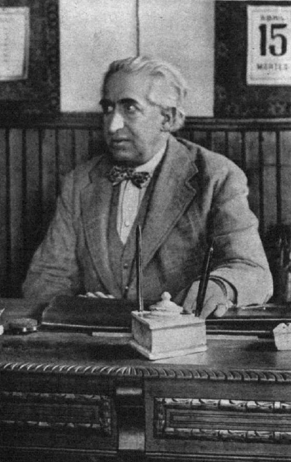 Fotografía del político español Eduardo Barriobero publicada en 1931 para ilustrar un artículo dedicado a los parlamentarios juristas